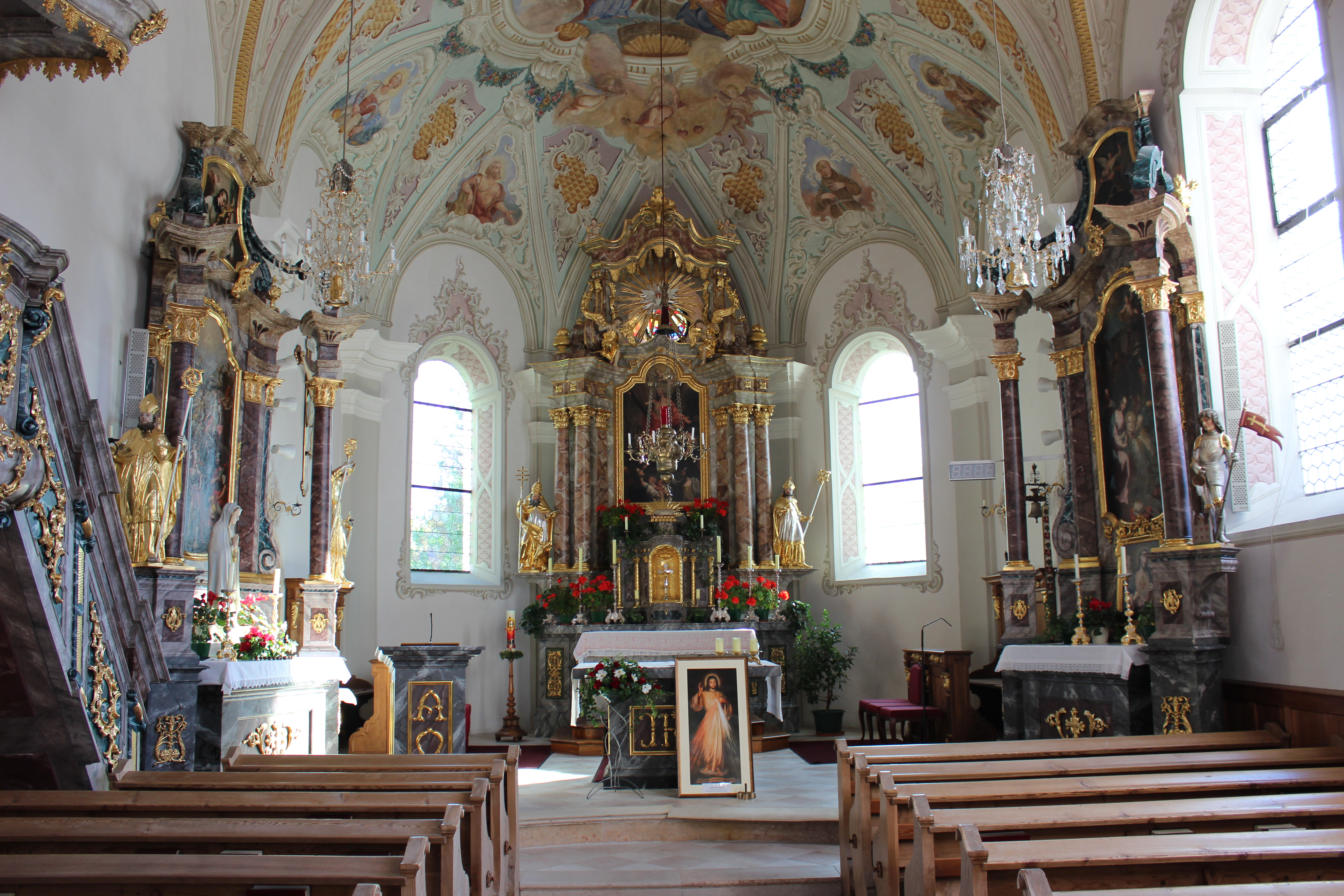 Altar der Kath. Pfarrkirche hl. Andreas in Abfaltern, Gemeinde Abfaltersbach in Osttirol, Österreich.